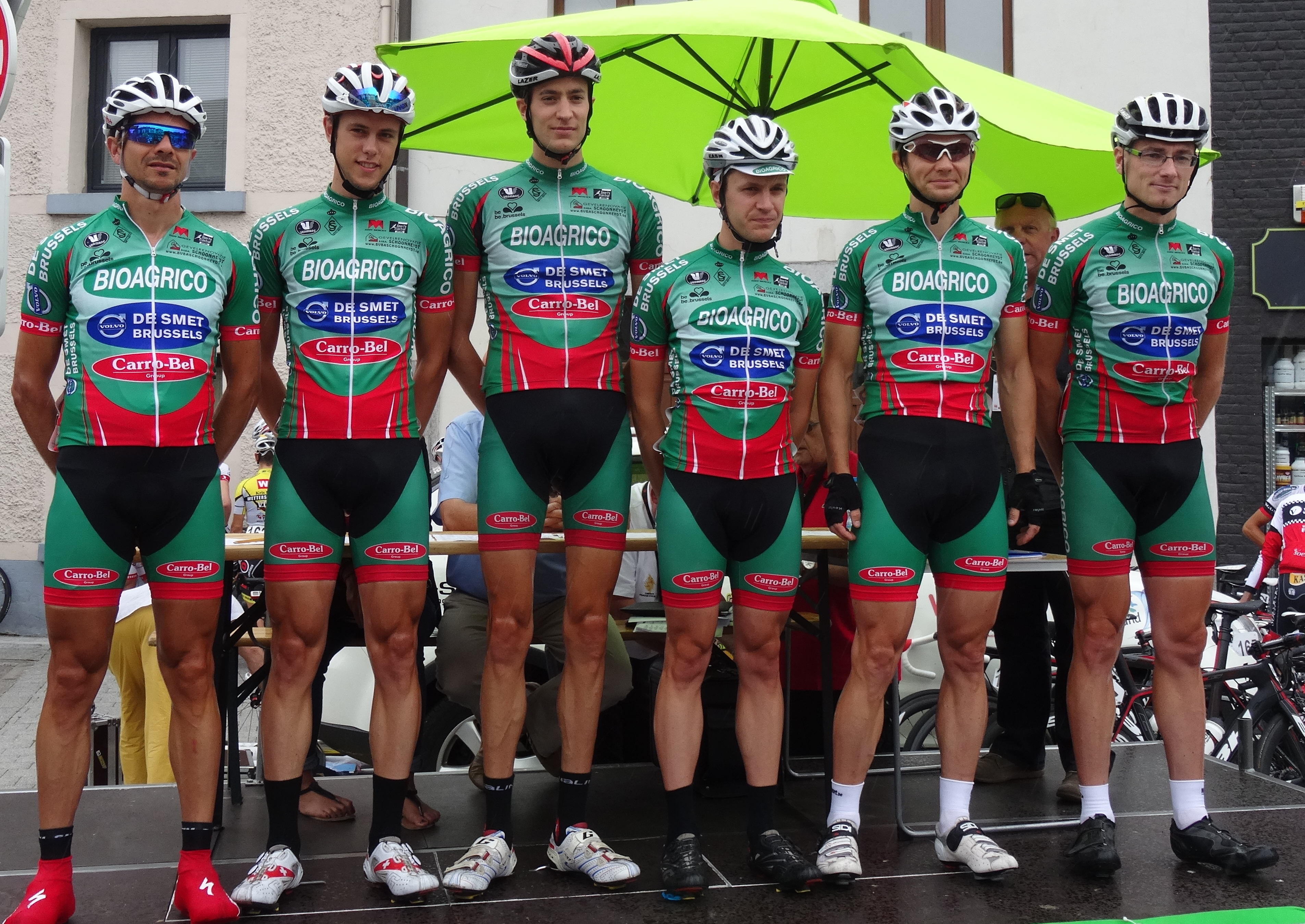 Reportage photographique réalisé le mercredi 6 août à l'occasion du départ de la première étape du Tour de la province de Namur 2014 à Jambes (Namur), Belgique.